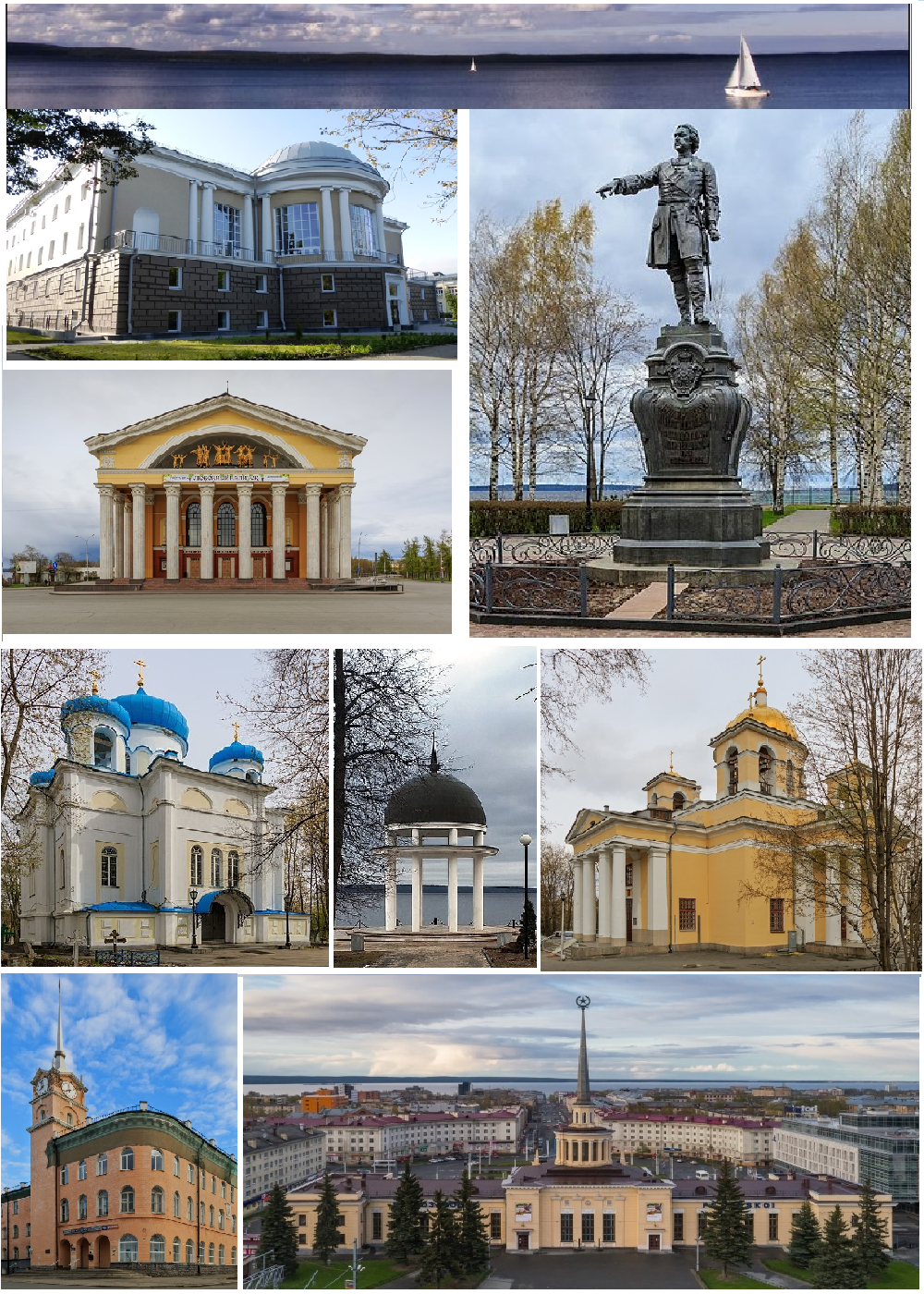 Коллаж для статьи о Петрозаводске из фотографий: Photo by AKA MBG Photo by Semenov.m7 Photo by A.Savin Photo by A.Savin Photo by A.Savin Photo by Semenov.m7 Photo by A.Savin Photo by A.Savin Photo by A.Savin